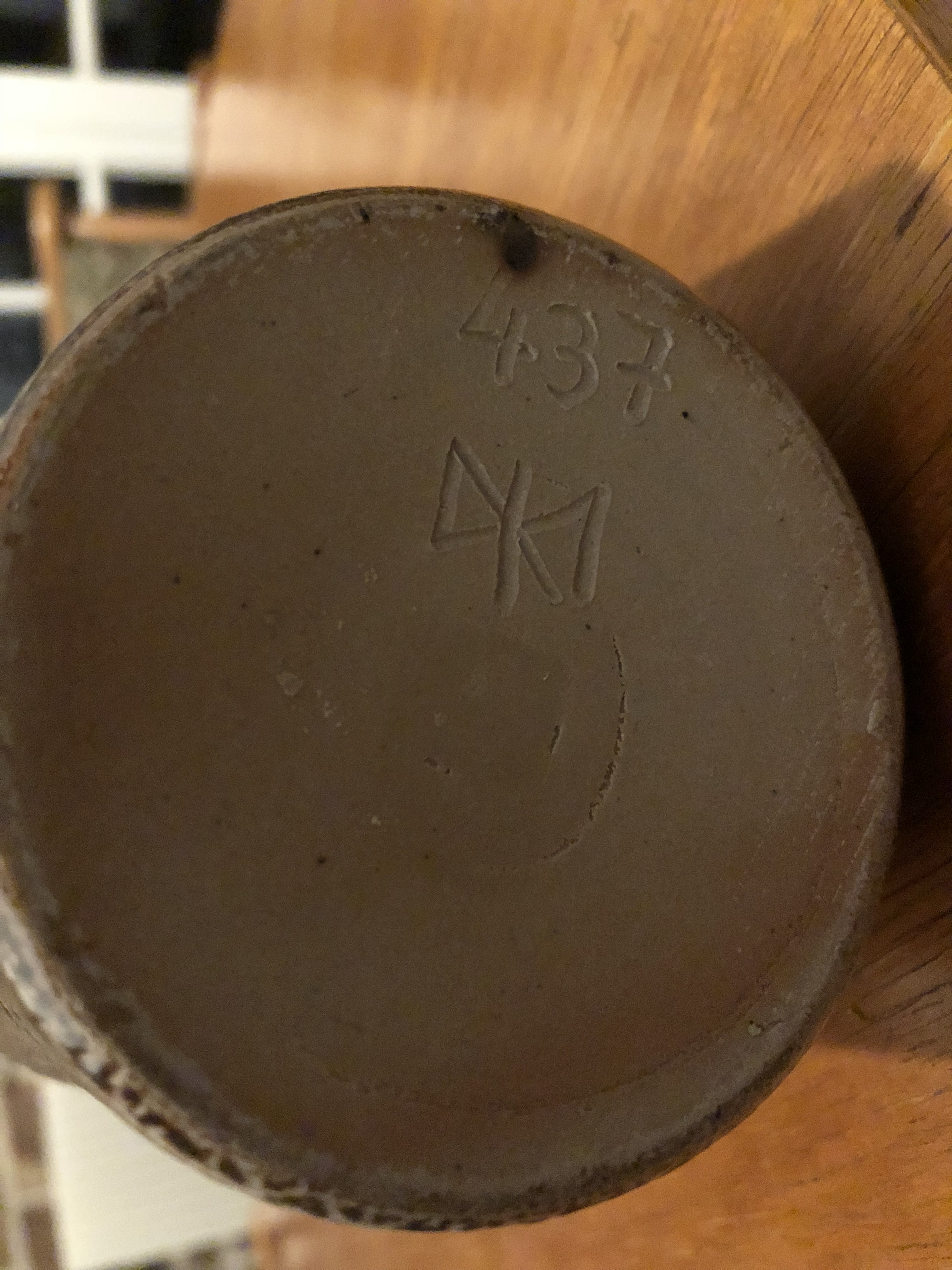 Signatur Wim Mühlendyck